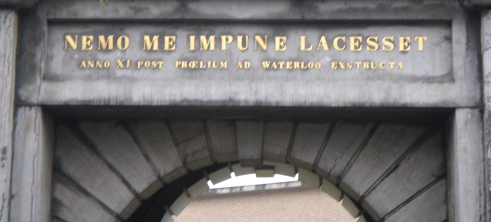 citadelpark Gent